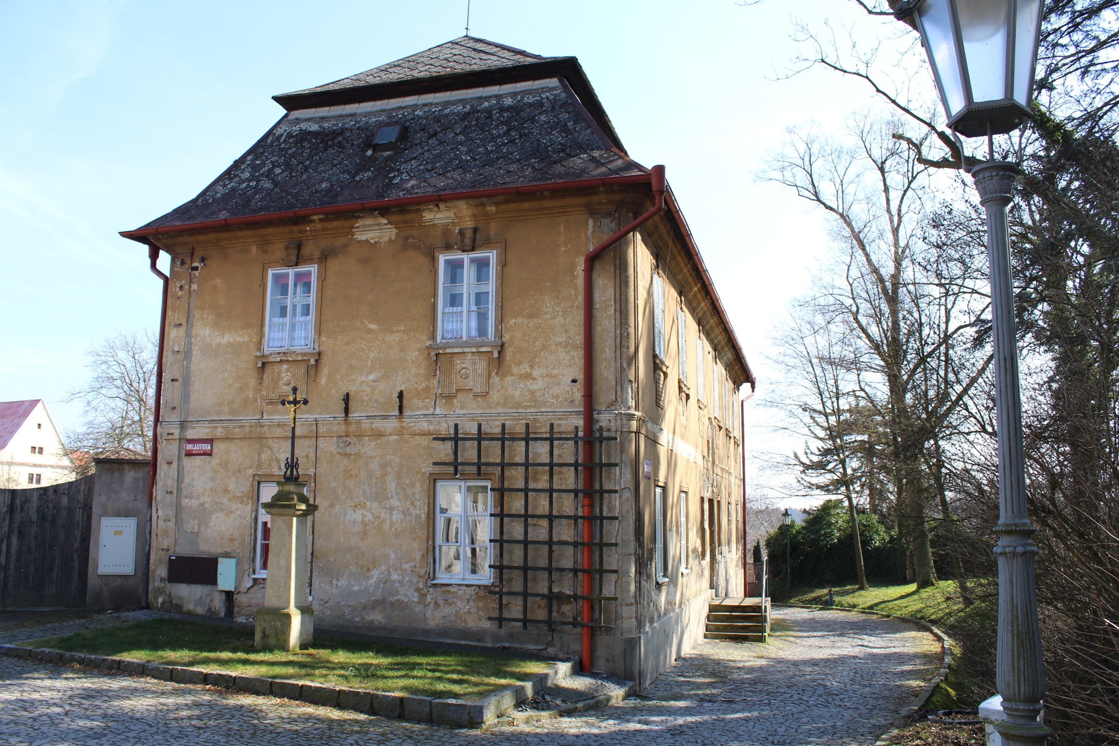 Bělá, kostel Povýšení sv. Kříže